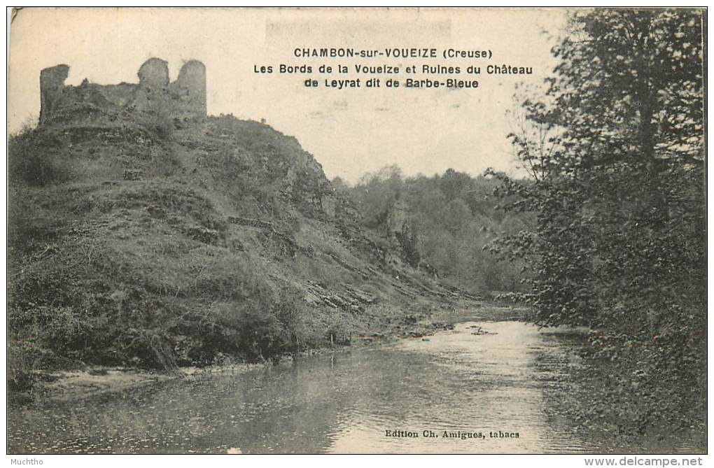 Carte postale ancienne des ruines du château de Leyrat (« château de Barbe Bleue »), à Chambon-sur-Voueize, Creuse, Nouvelle-Aquitaine, France